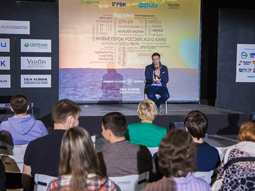 Питчинг. Кинохакатон